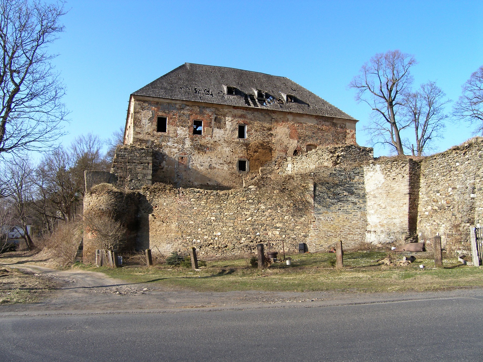 Toužim, Horní (Janův) zámek s částí opevnění bývalého hradu.